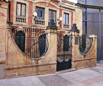 FACHADA NORTE CASA LIS